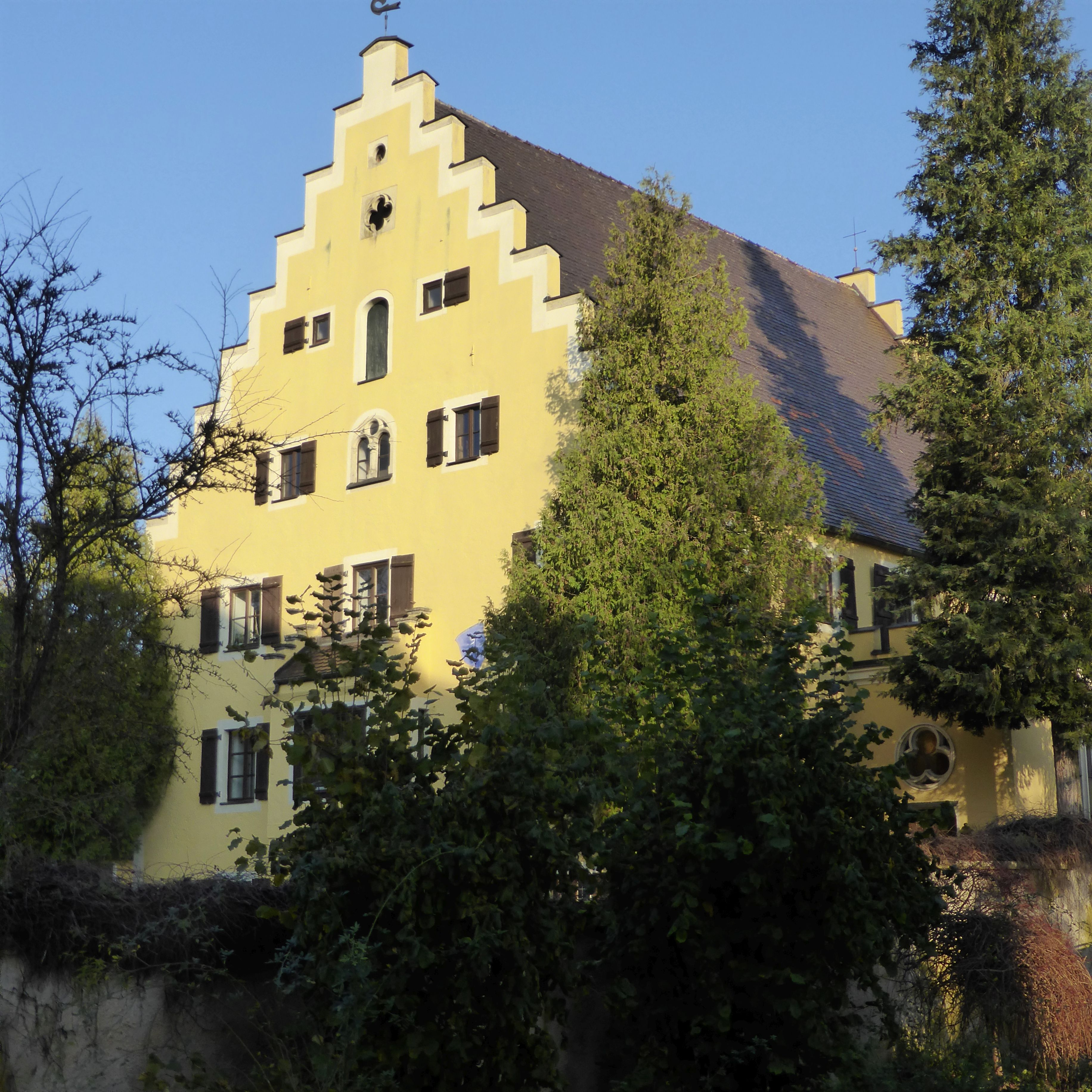 Heitzenhofen (Hofmarksschloss)